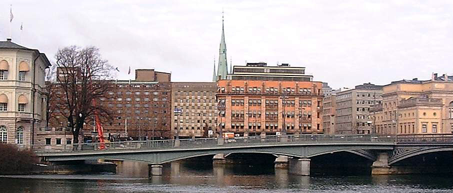 A corner of Strömsborgsbron, Gamla stan, Stockholm.